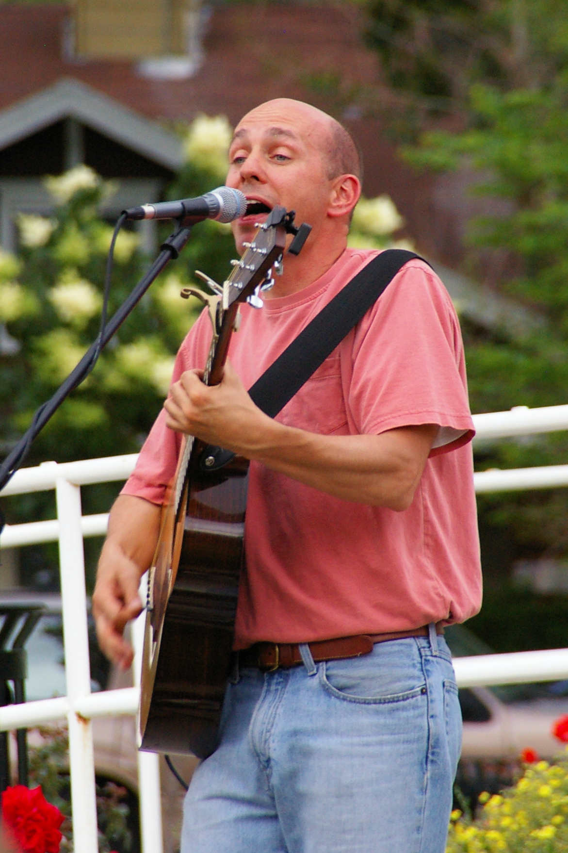 Peter Breinholt performs in Draper, Utah.